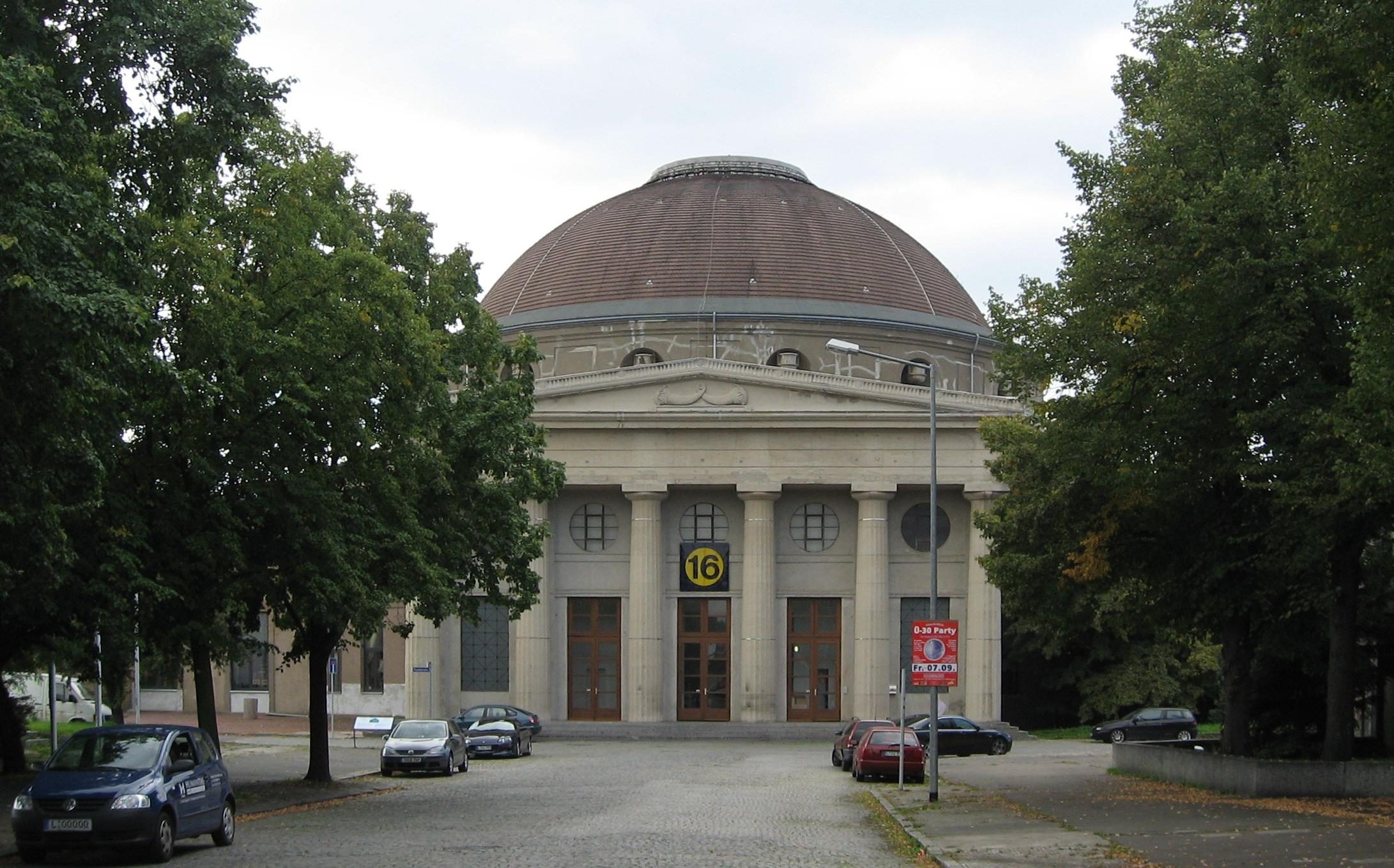 Leipzig, Ausstellungshalle 12 für die Internationale Baufachausstellung 1913 (jetzt Halle 16 auf der Alten Messe), erbaut von Wilhelm Kreis; Kfz-Kennzeichen unkenntlich gemacht